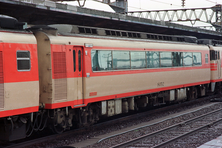 名古屋鉄道 8052